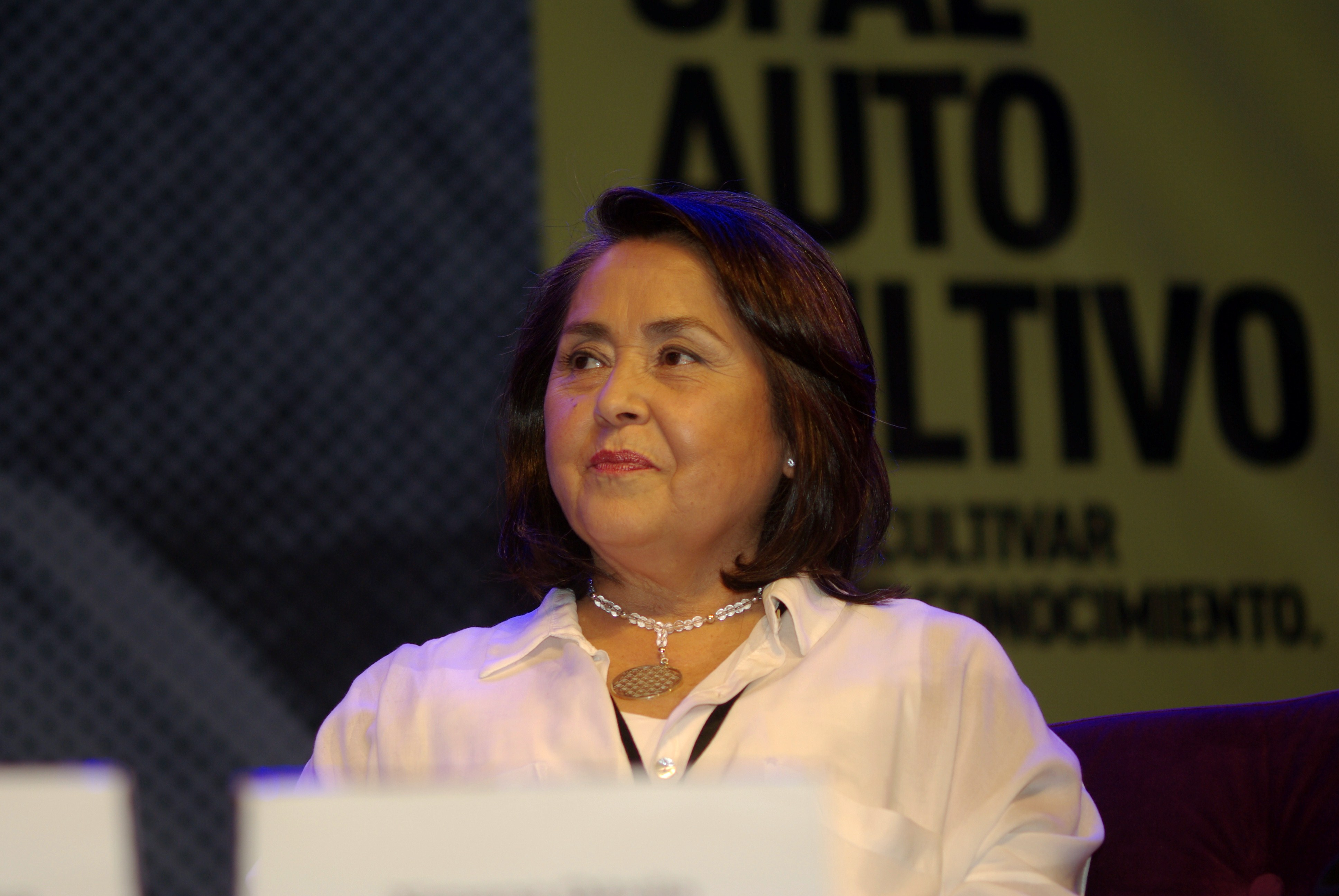 La orientadora en relaciones humanas Ximena Dávila (Chile) en la Feria Internacional del Libro de Santiago 2015